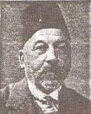 מאיר גאני